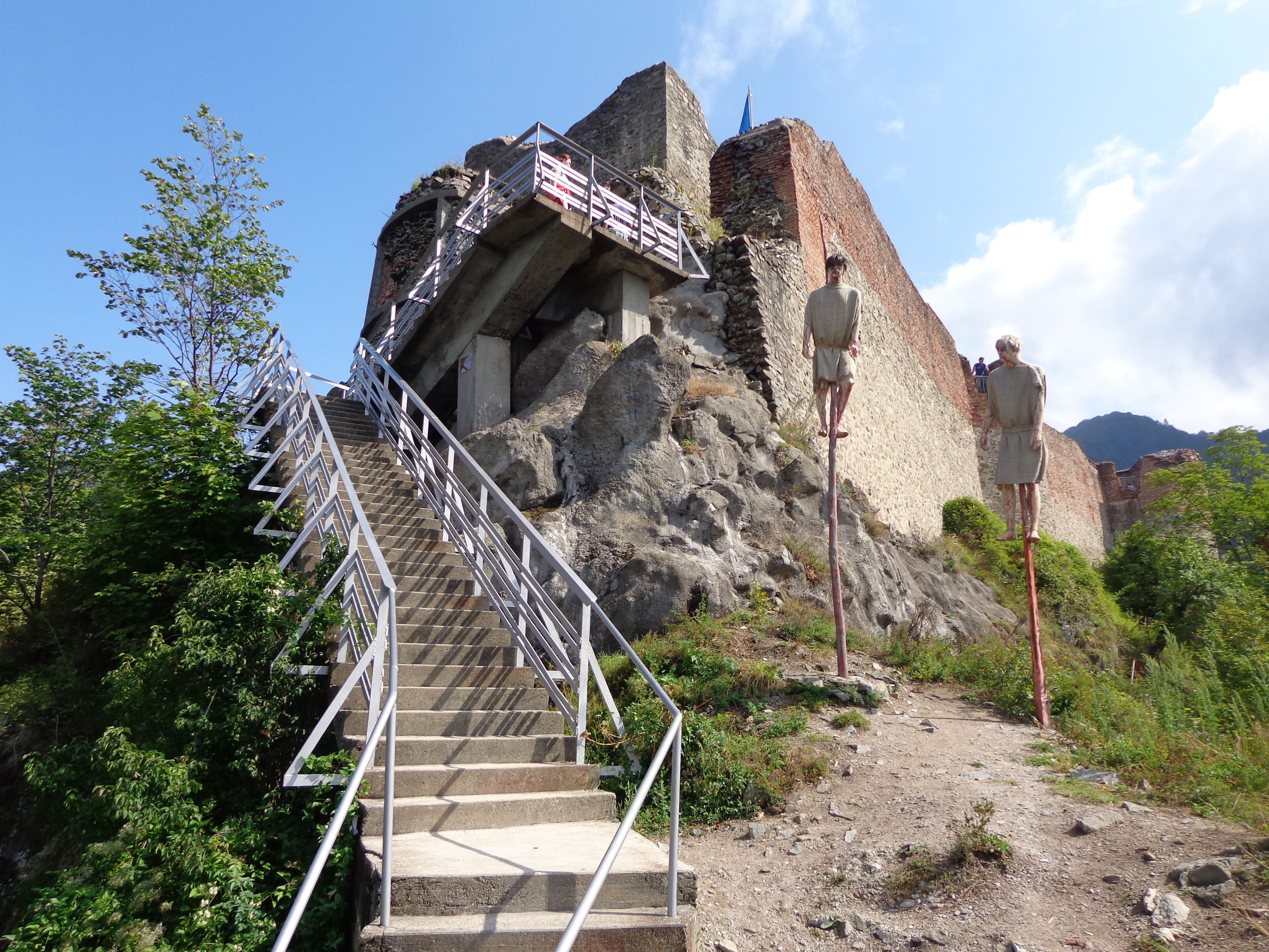 Cetatea Poenari a fost atestata documentar in 1453 si a aprtinut familiei Vlad Dracul. Se presupune ca cetatea retrasa, departata de drumurile comerciale ar fi fost de refugiu, loc de intemnitare a dusmanilor sau de adapostire a vistieriei tarii. 01